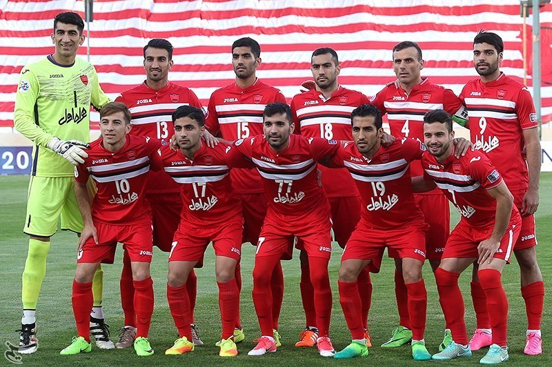 تیم فوتبال پرسپولیس در دیدار برابر لخویا قطر در لیگ قهرمانان آسیا ۲۰۱۷